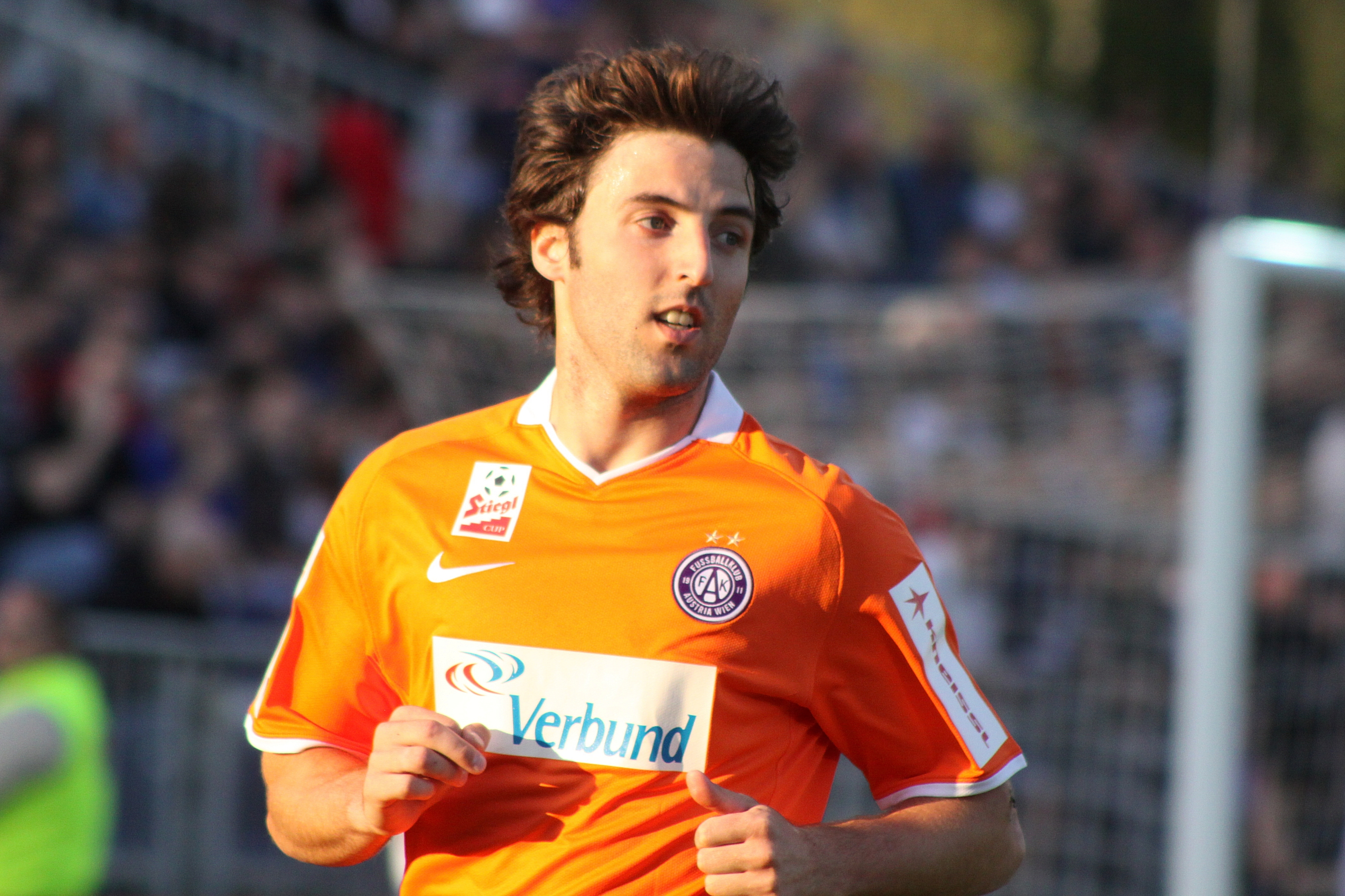 Joachim Standfest im Spiel - FK Austria Wien